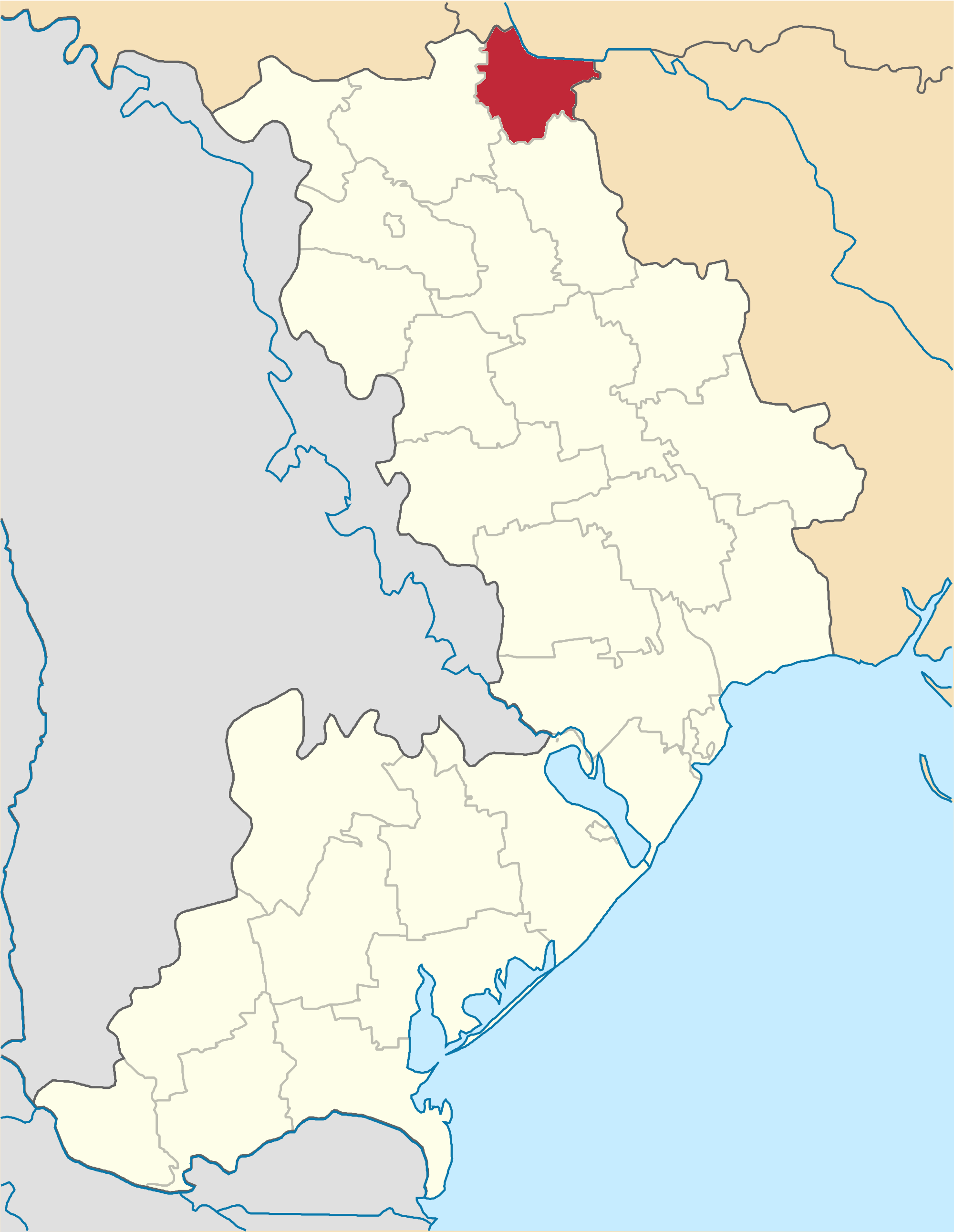 Savranskyi-Raion map